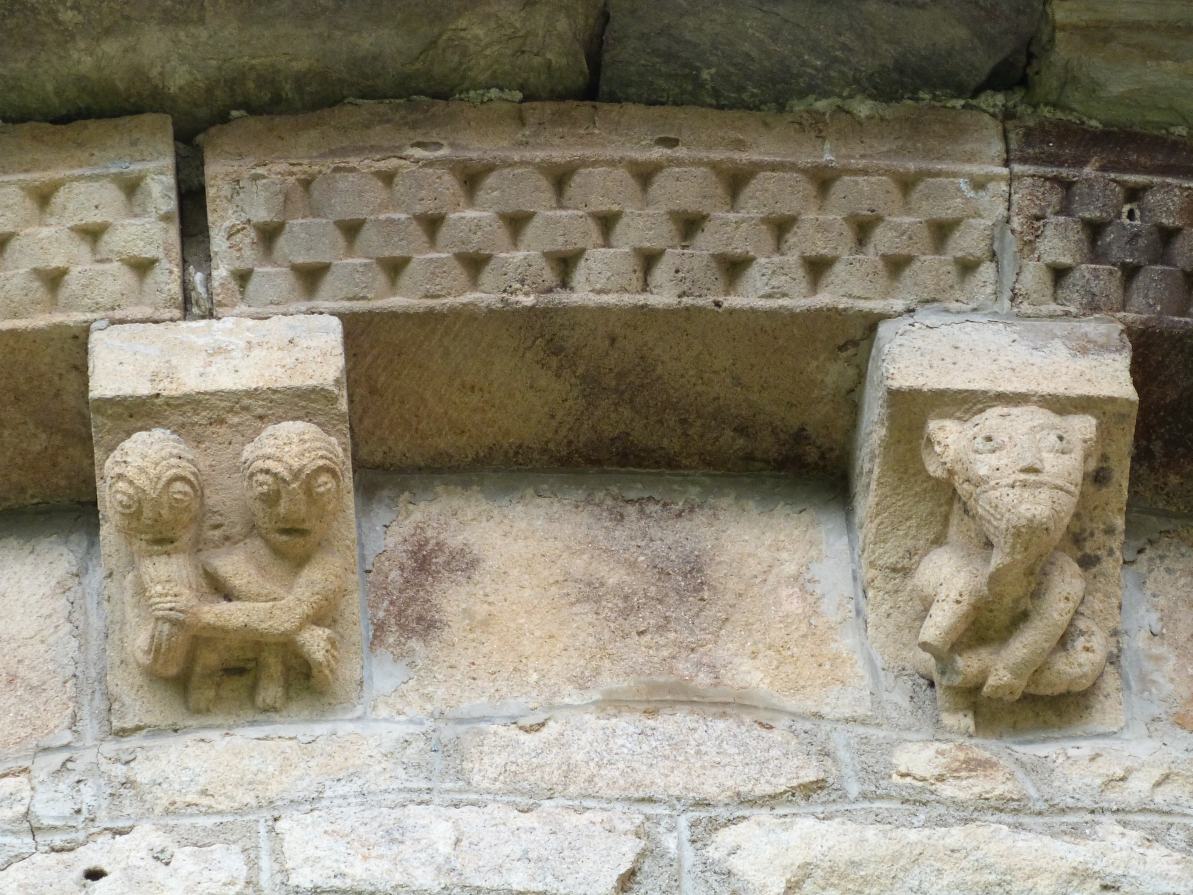 Église Saint-Jean-Baptiste (Inscrit) .